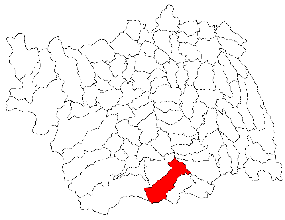 Categorie:Hărţi ale judeţului Bacău